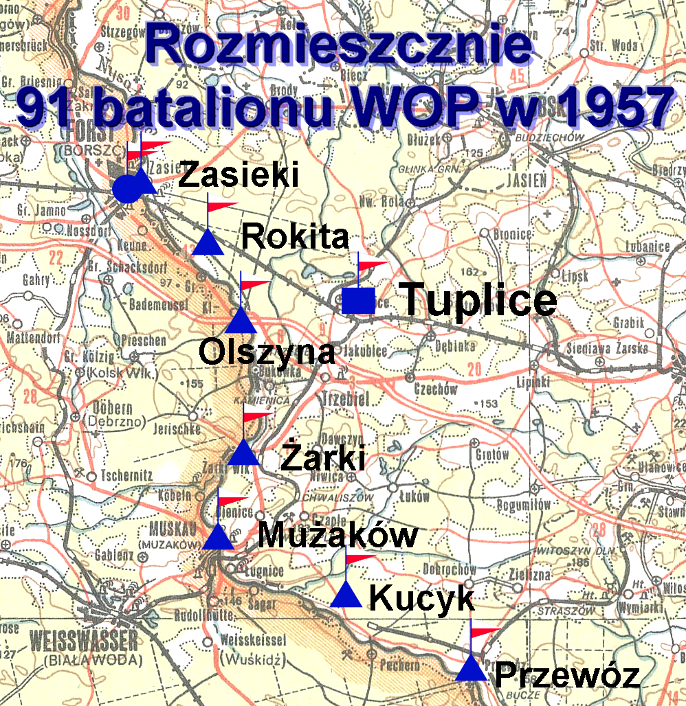 Rozmieszczenie 91 batalionu WOP w 1957